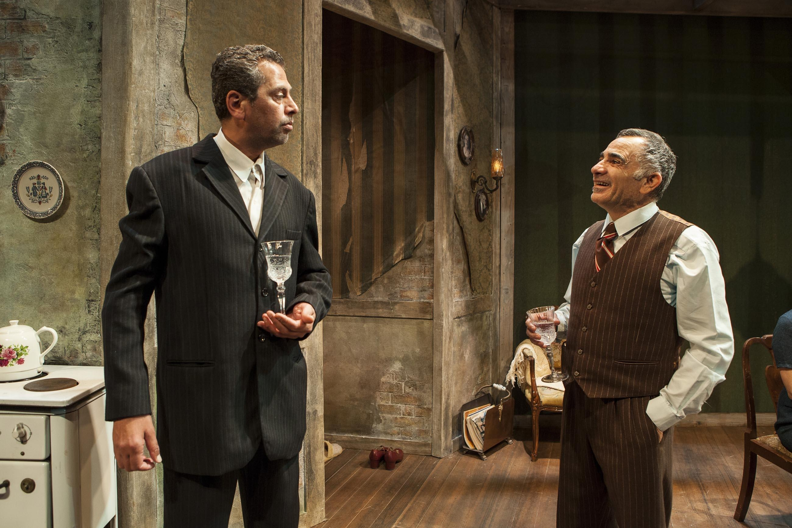 משה איבגי וח'ליפה נאטור בהצגה "אנשים קשים" מאת יוסף בר-יוסף, בבימויו של משה נאור, תיאטרון חיפה, 2012